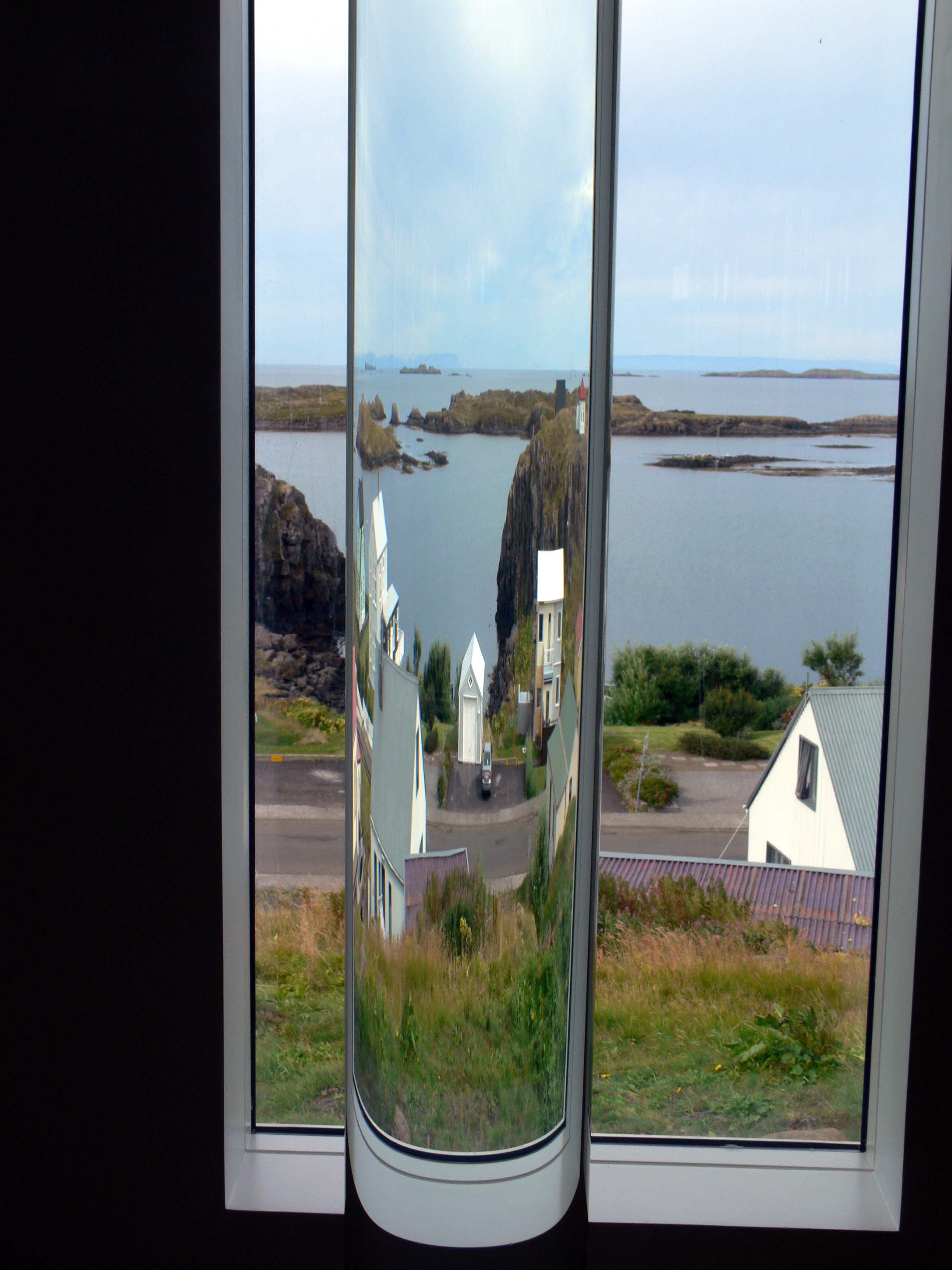 Stykkishólmur,Wassermuseum. Dort wird in Glassäulen Wasser aus allen Gletschern Islands gezeigt.